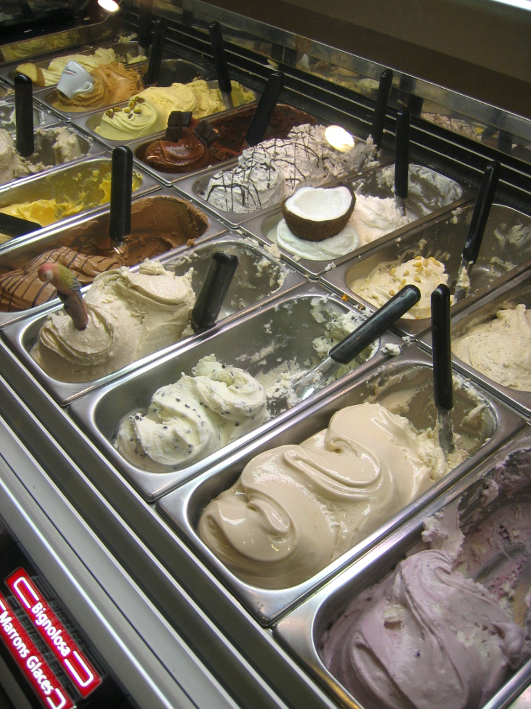 Italská zmrzlina. Sicilianu: Lu jilatu.